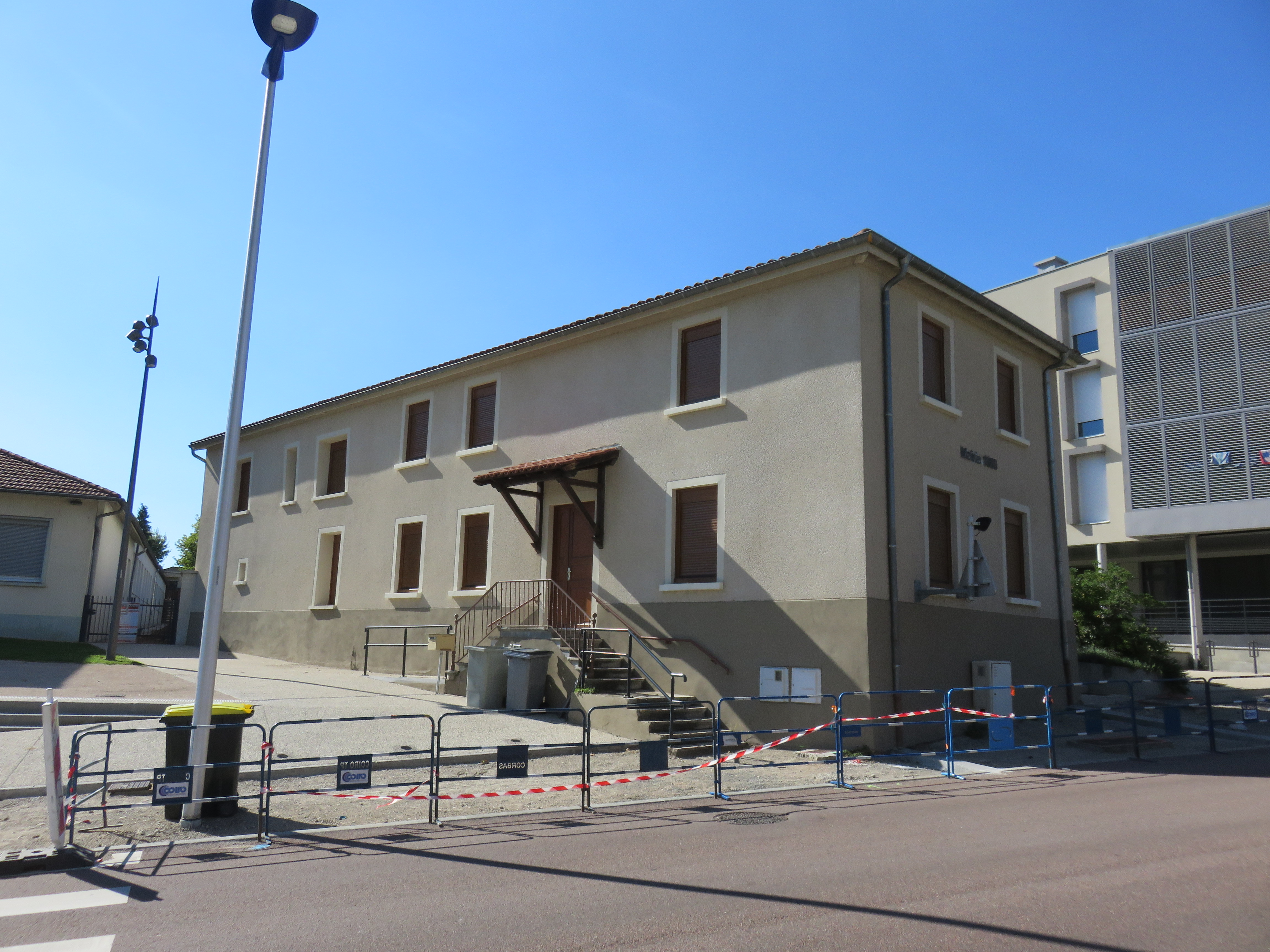 Ancienne mairie, appelée "mairie 1860" à Corbas (Rhône, France).